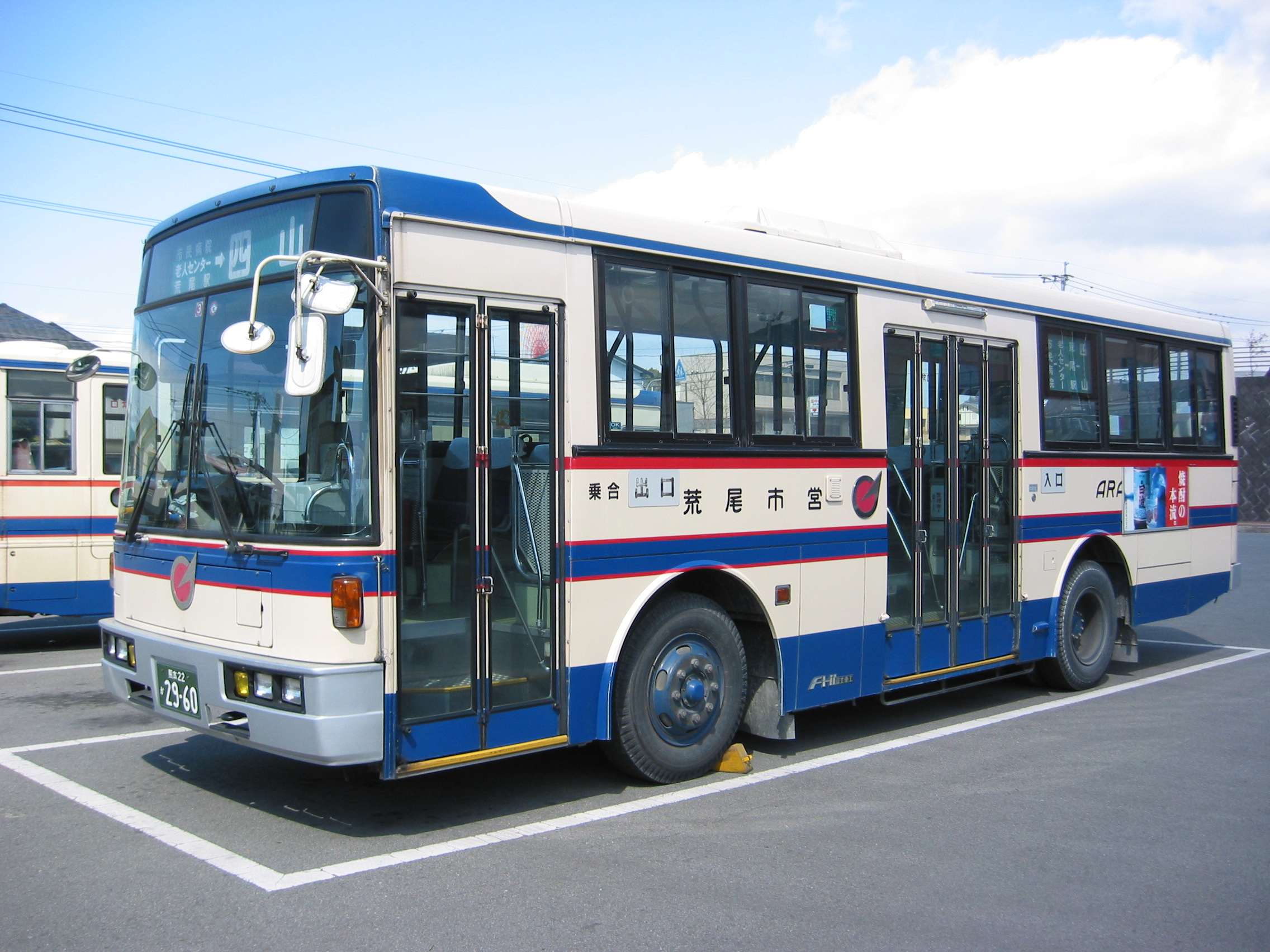 荒尾市交通局（荒尾市営バス）の車両